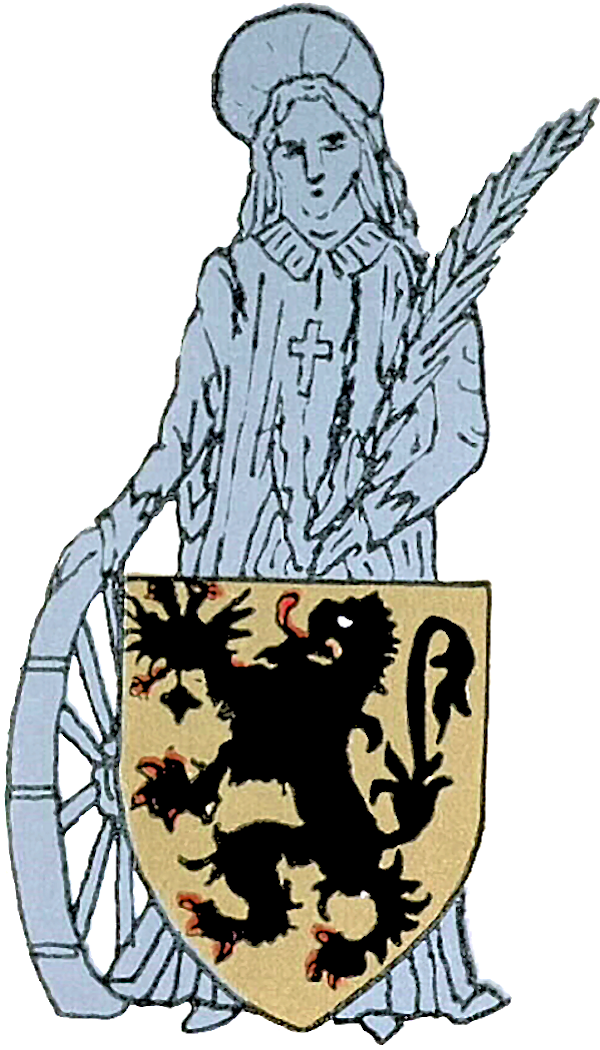 Wapenschild van Wachtebeke